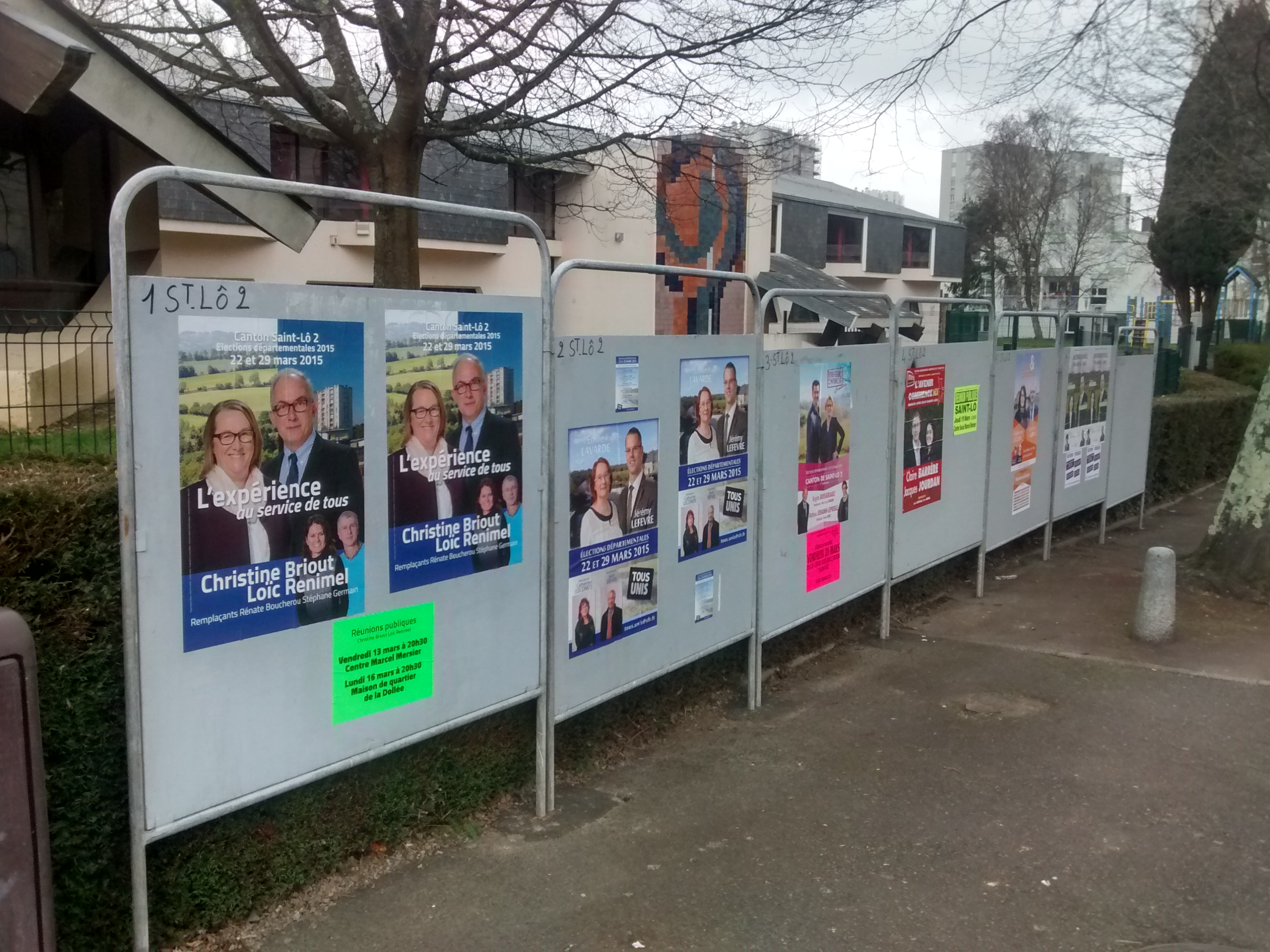 Élections départementales au bureau de vote de Calmette et Guérin